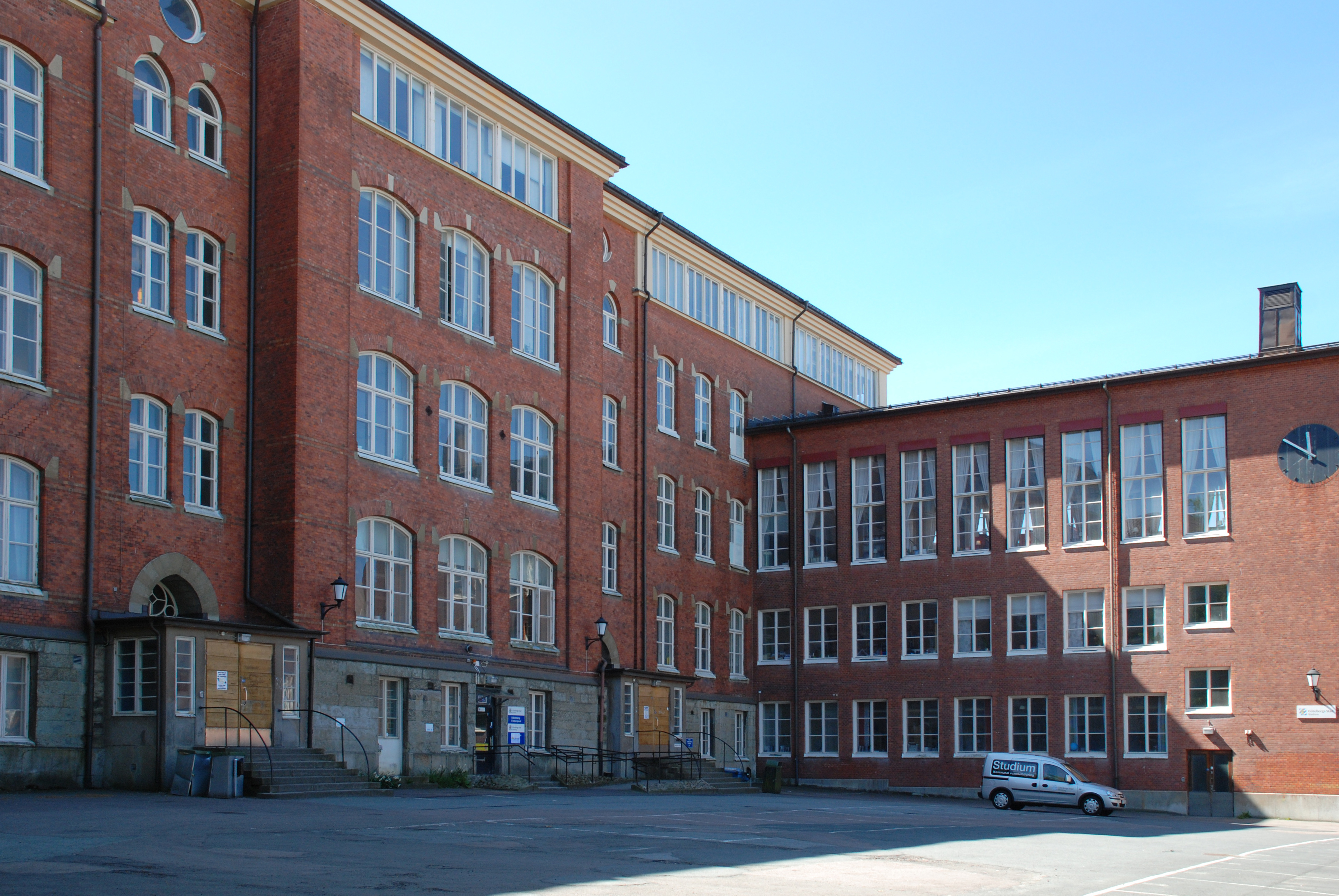 Göteborg Västra realskola (senare Majornas Högre Allmänna Läroverk och Majornas gymnasium) vid Allmänna Vägen i Göteborg.